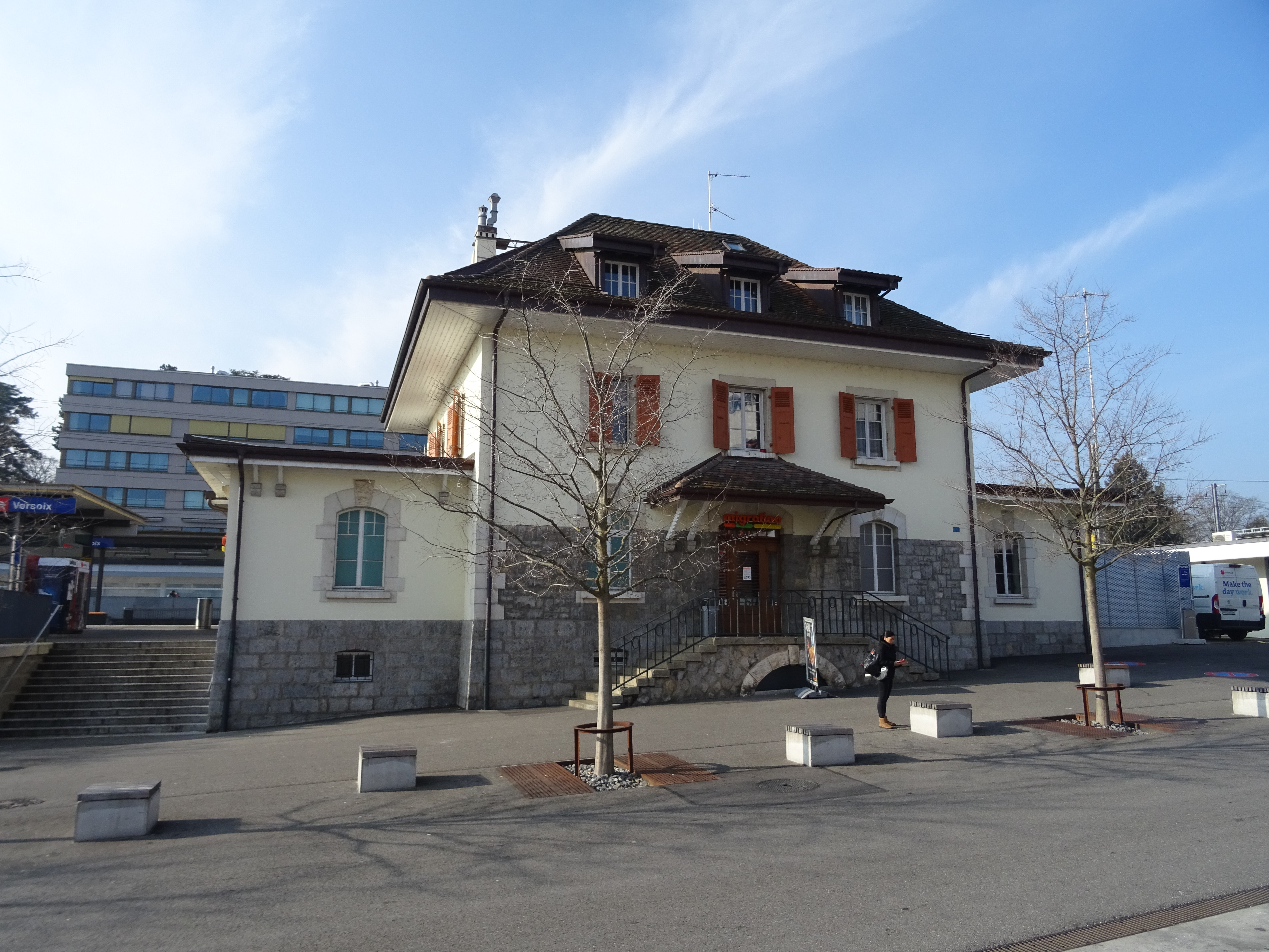 Bâtiment voyageurs de la gare de Versoix.